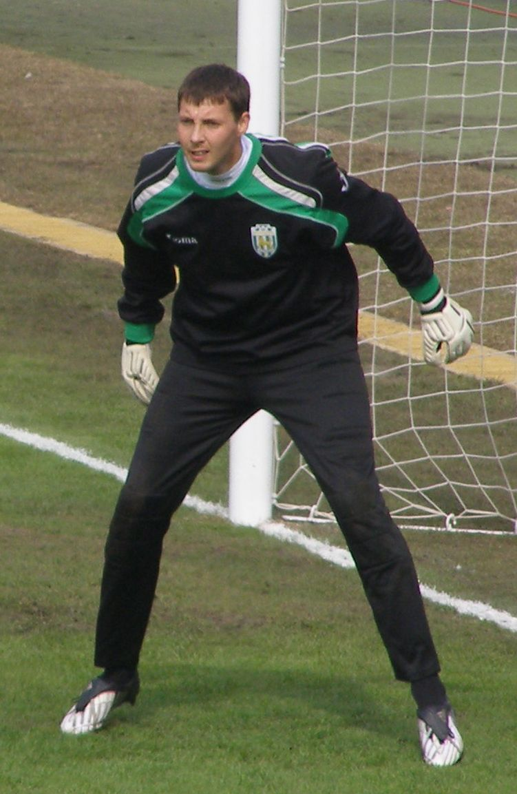 Andrij Tlumak - ukrainischer Fußballspieler